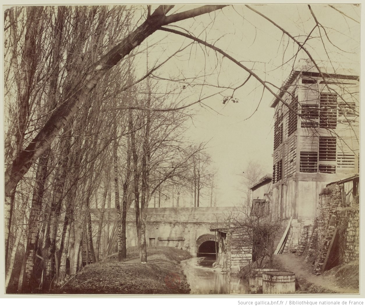 Boulevard d'Italie Bièvre